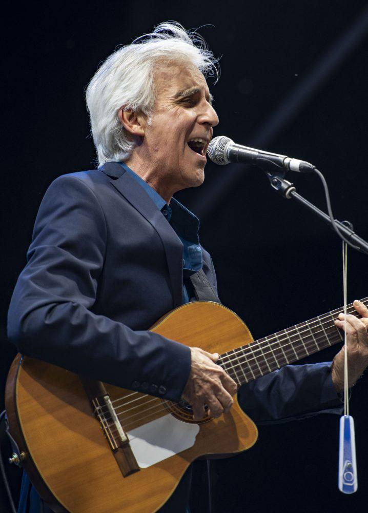 Los sonidos más rumberos se apoderaron ayer de la noche madrileña. Miles de personas abarrotaron los escenarios, a un lado y a otro del río.